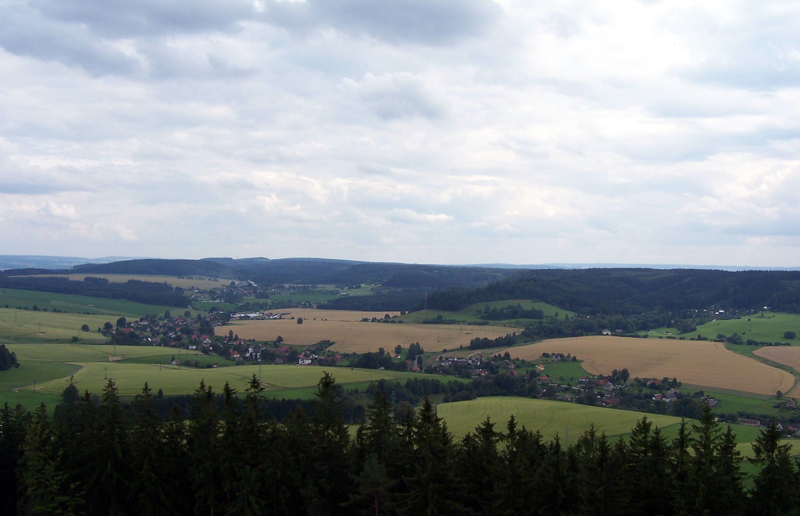 Obec Řetová z rozhledny Andrlův chlum. Obec se rozkládá skoro přes celý záběr, pouze vlevo zcela zvadu je obec Přívrat. Za ní je kopci nezřetelně vidět rozhledna Kozlovský kopec.